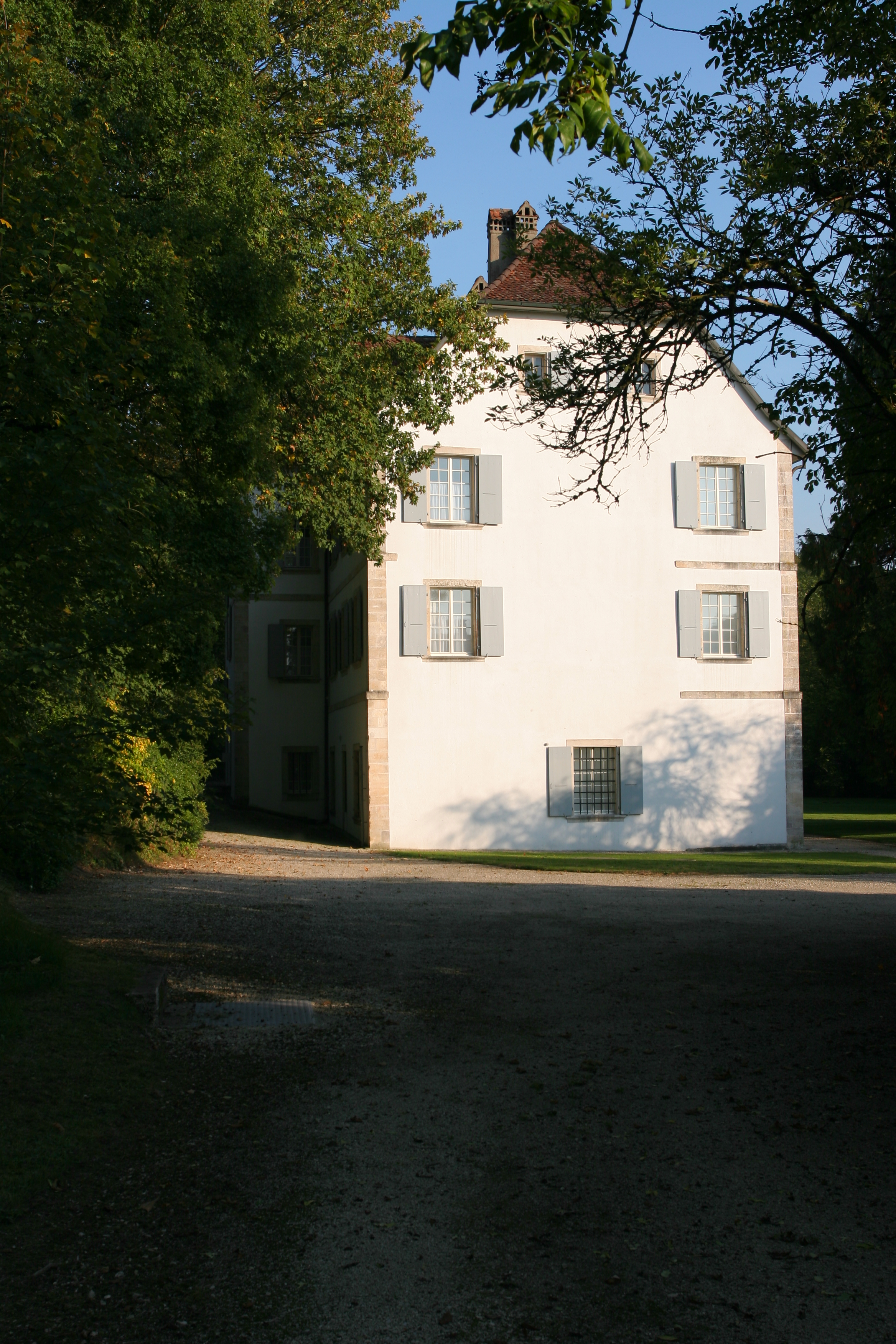 Vue ouest de l'ancien Prieuré de Grandgourt depuis le portail principal